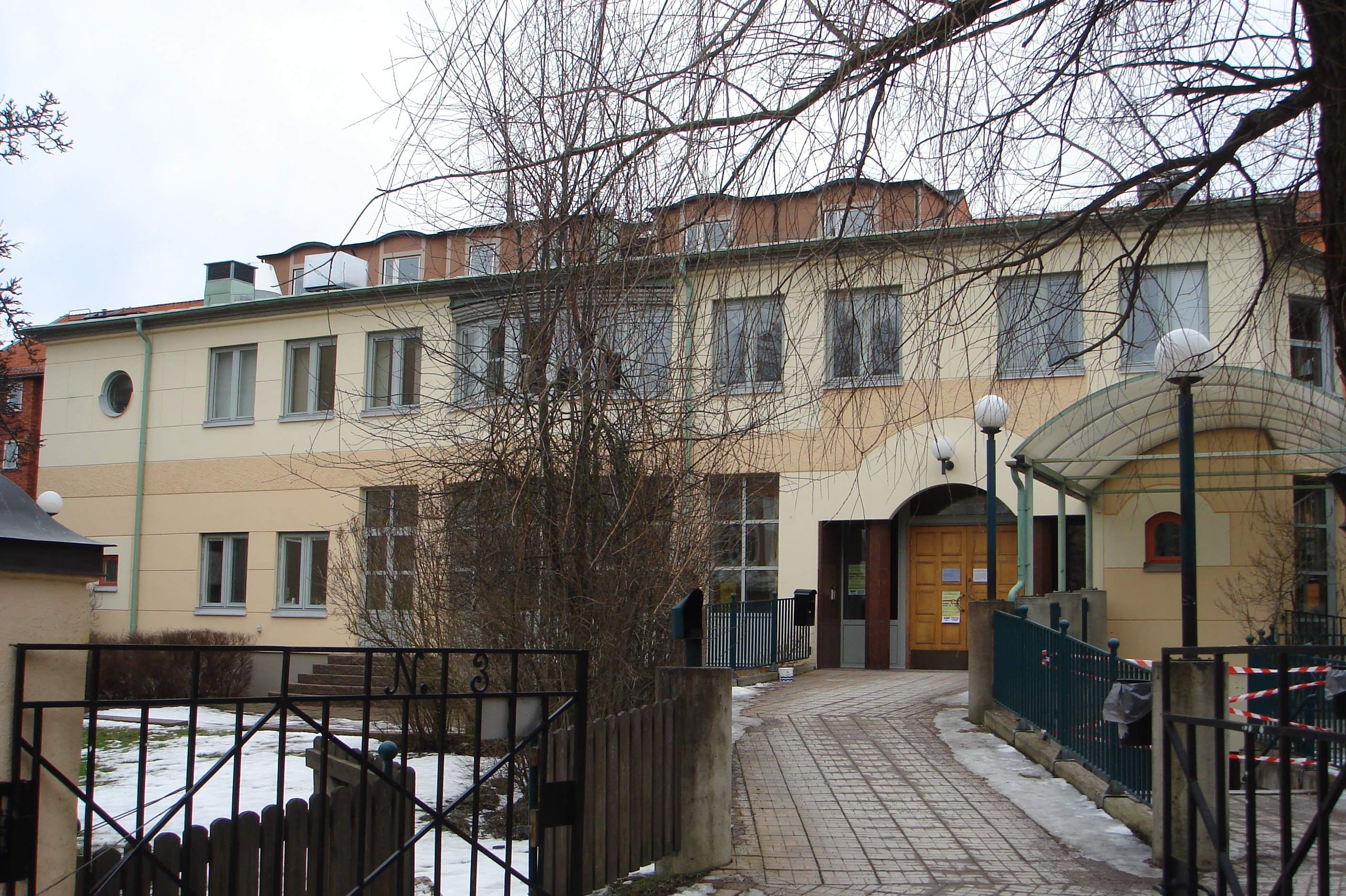 Kalmar nation, Uppsala, Sweden